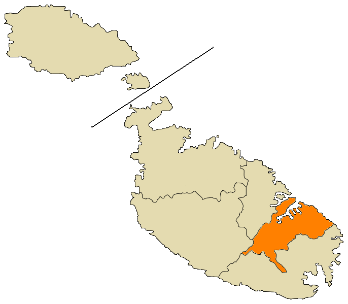 Mapa de el Distrito del Puerto Meridional.